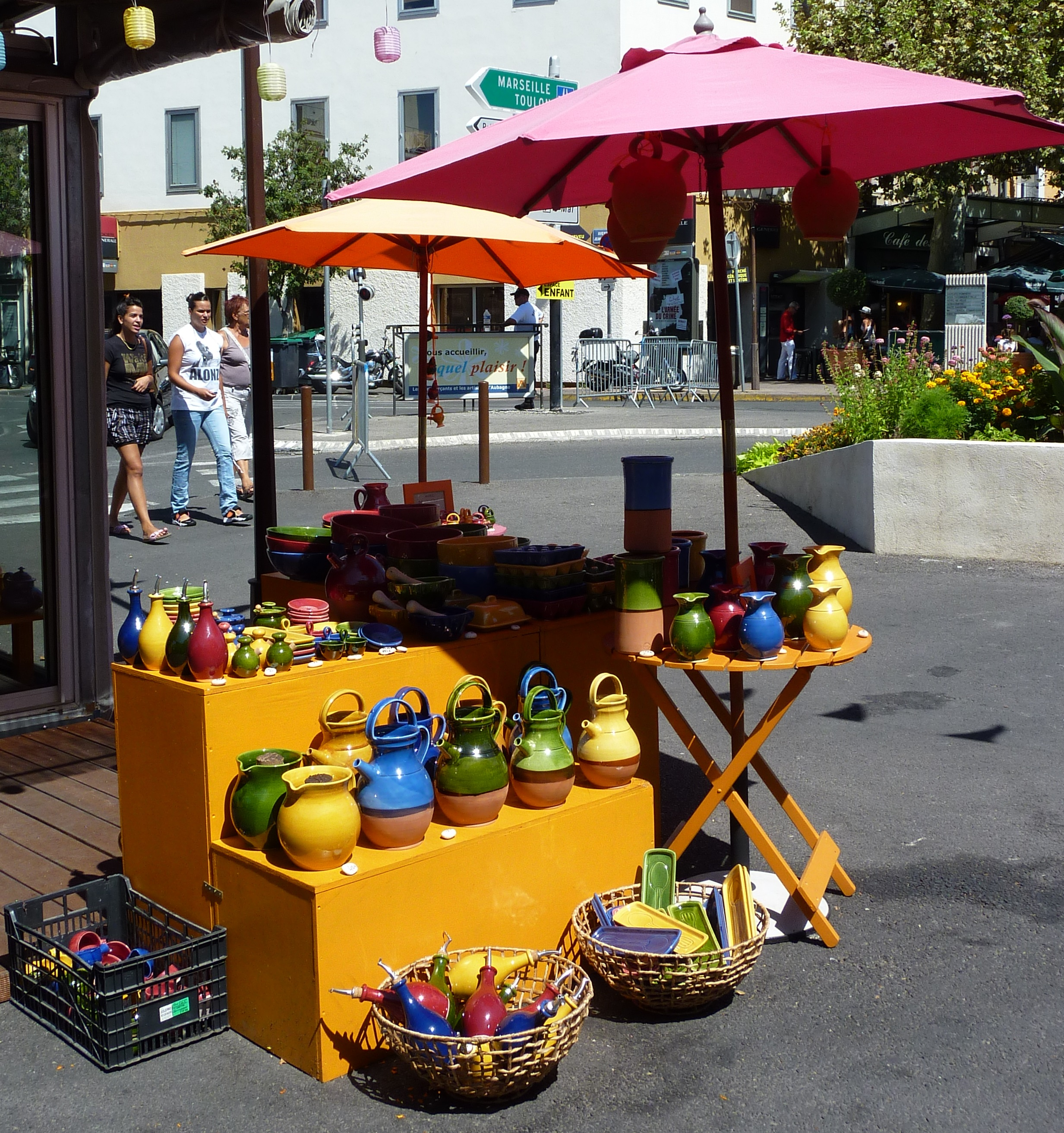 Stand de potier à Aubagne